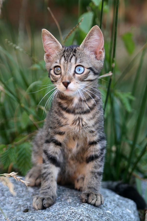 Lazuli, chat de type Ojos Azules, appartenant à la chatterie d'Aerlin.